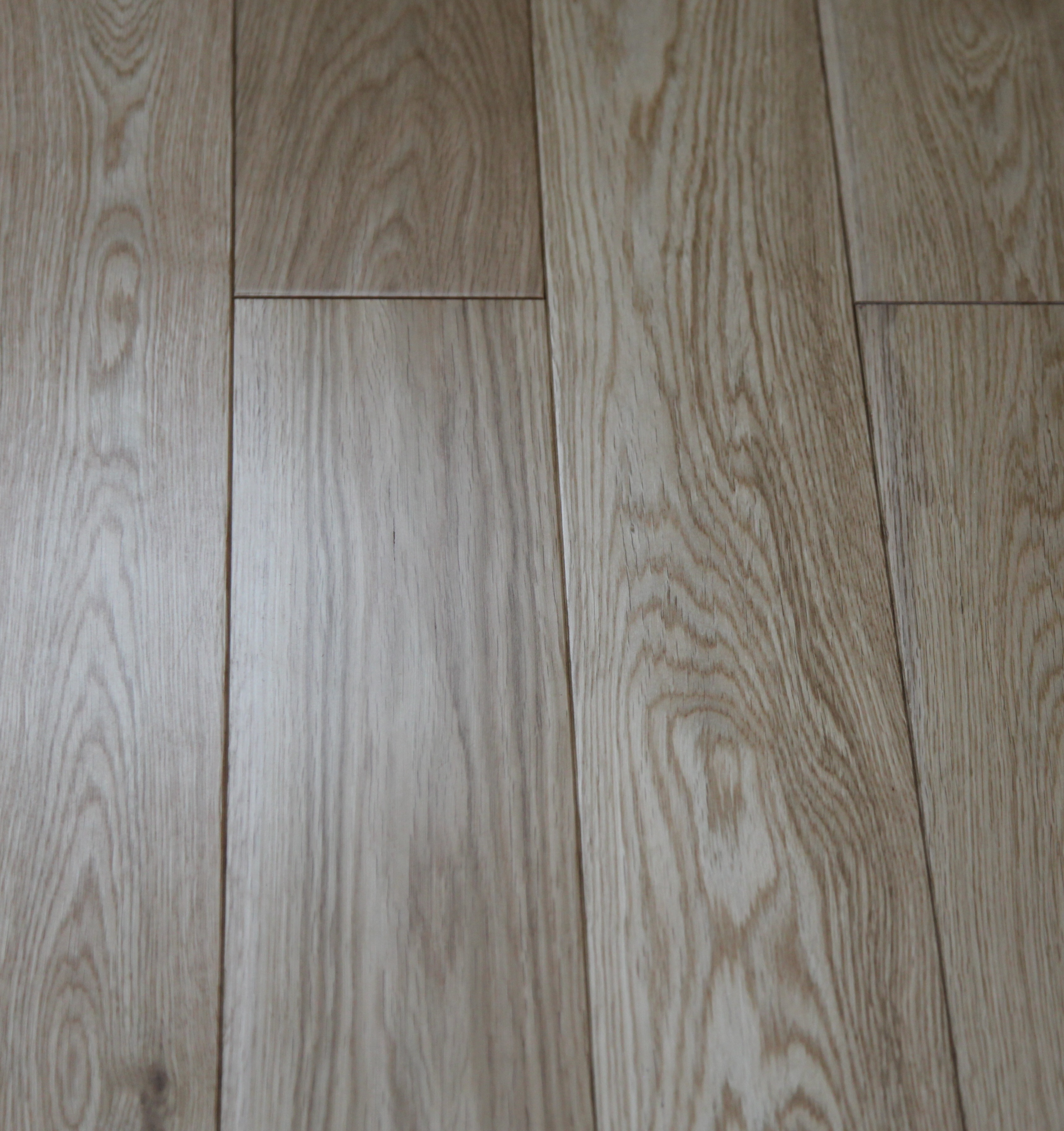 Дуб натуральный сортности AB